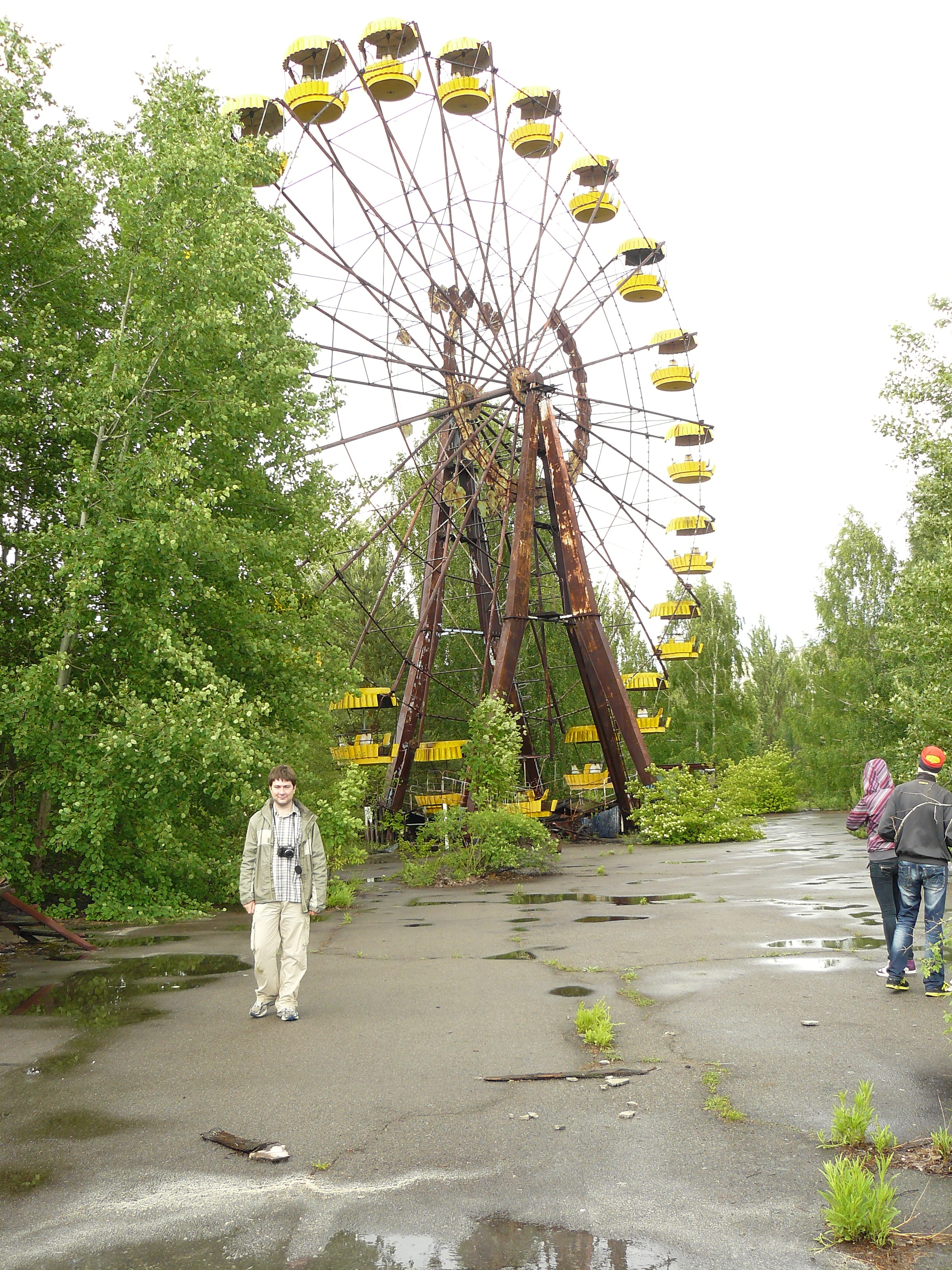 Вікіекспедиція до Чорнобильської зони. Прип'ять